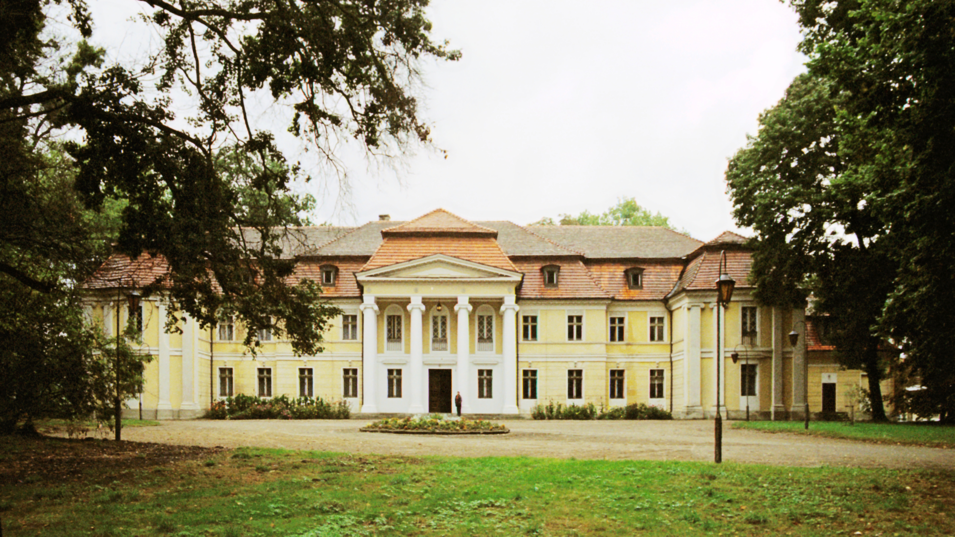 Dłoń, pałac z 1913 r.